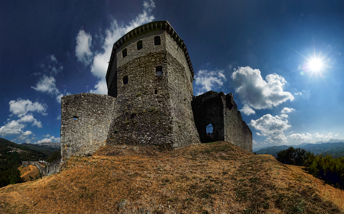 panoramica della fortezza di Verrucole This is a photo of a monument which is part of cultural heritage of Italy.